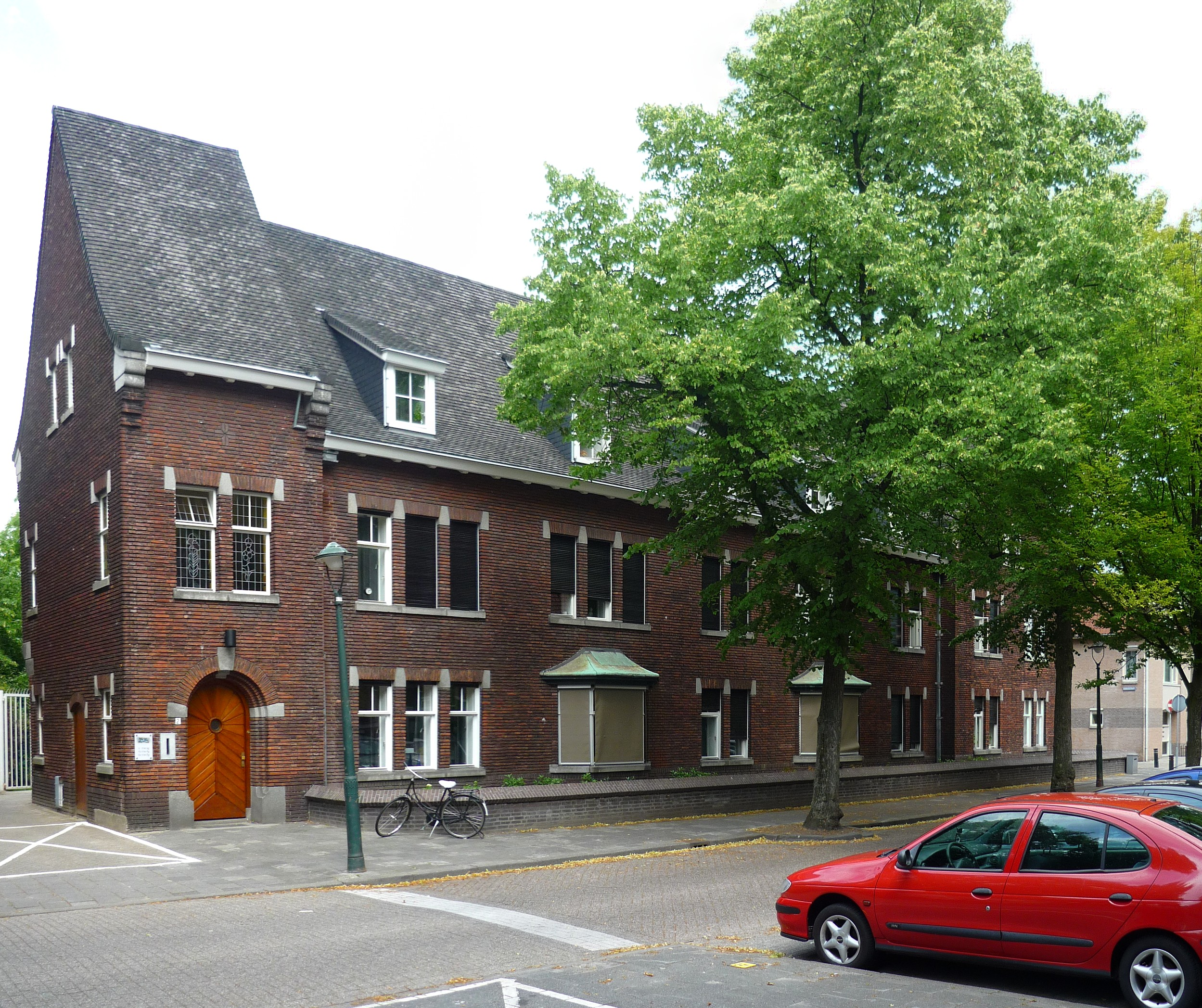 Klooster van de Zusters van Liefde te Den Bosch. Rijksmonument 522498